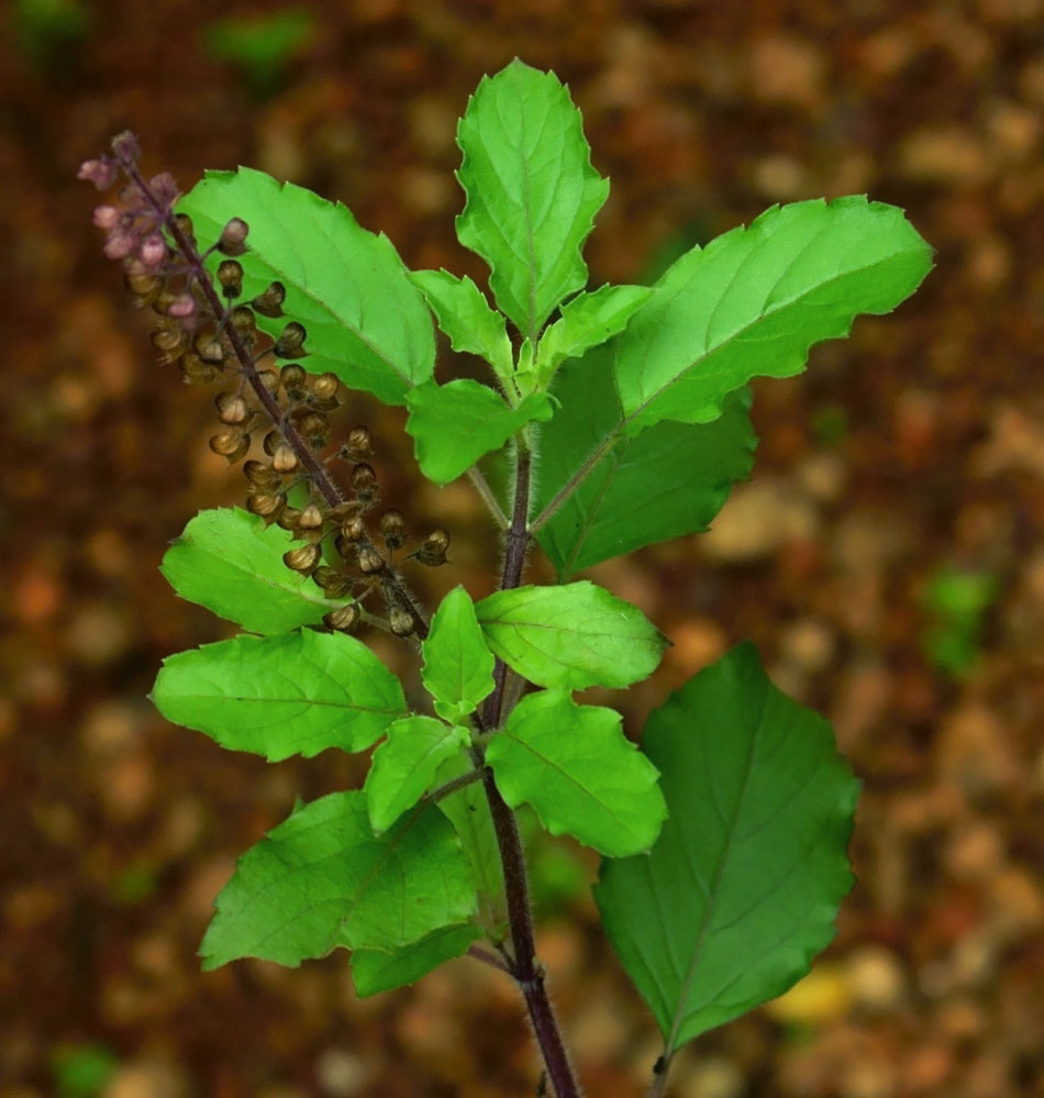 കൃഷ്ണതുളസി